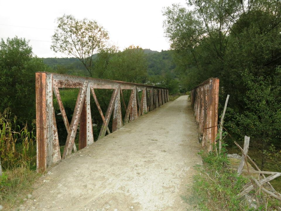 Podul metalic al căii ferate Berbești, dat în folosință în 1883. Astăzi în folosință pentru pietoni, animale, utilaje motorizate sau autoturisme. Podul este din metal.